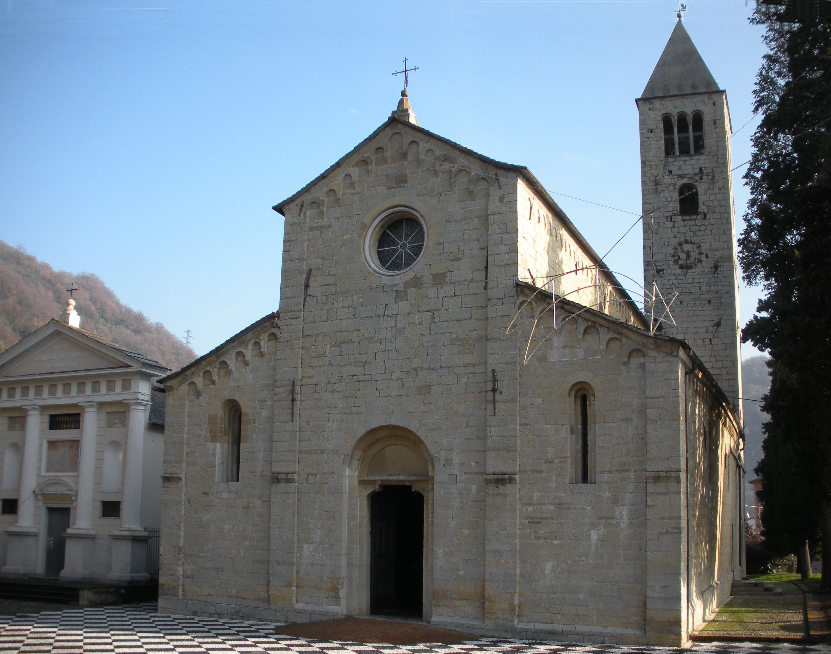 Chiesa di San Siro di Struppa (Genova)